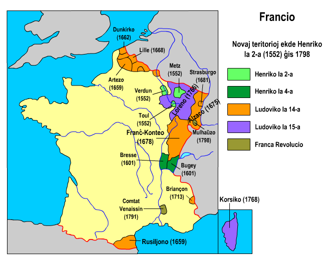 Novaj francaj teritorioj ekde Henriko la 2-a ĝis 1798